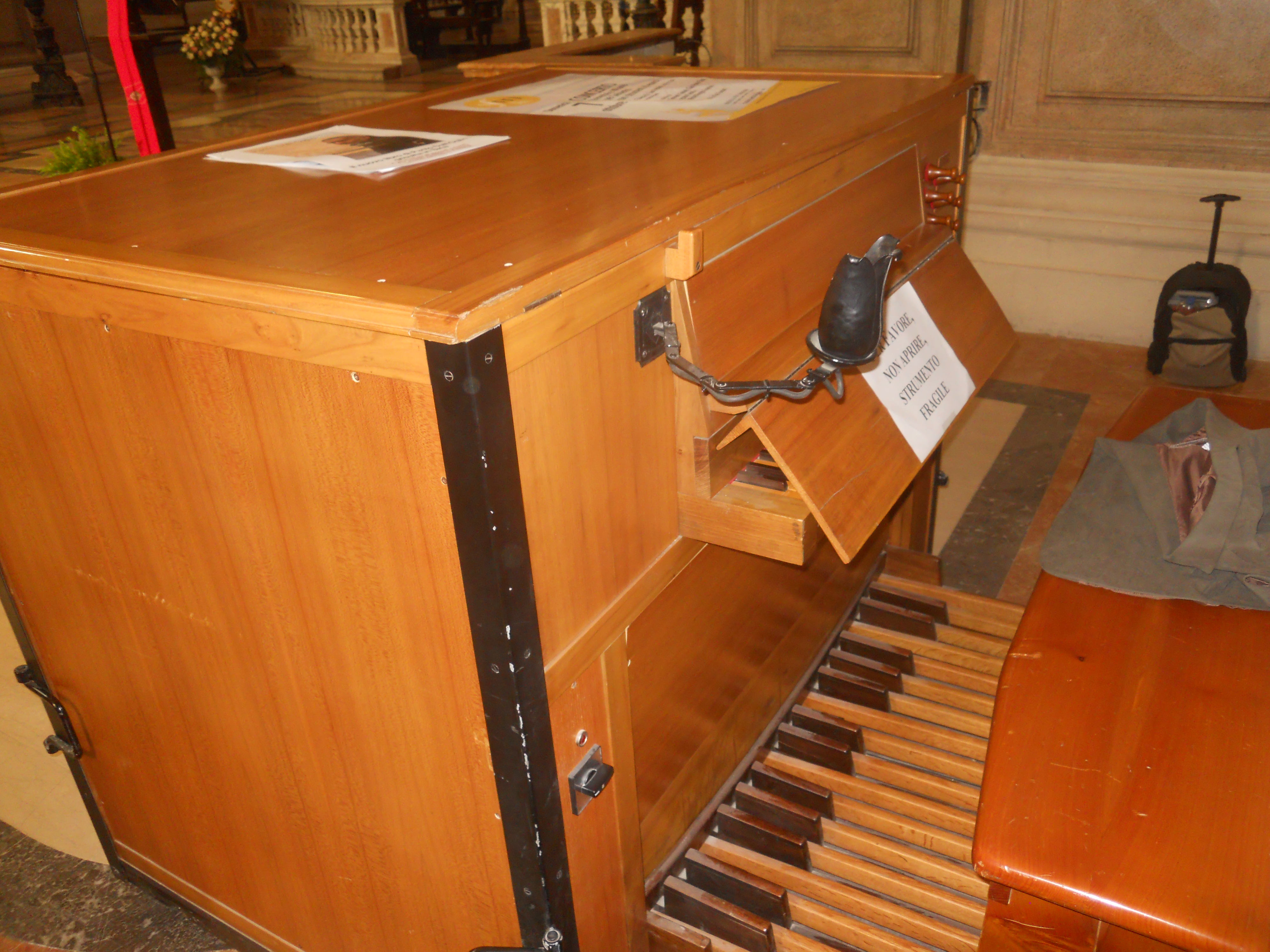 L'organo positivo Tamburini nella chiesa di San Fedele a Milano